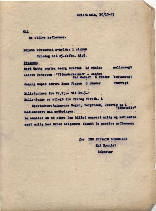 Brev til aktive medlemmer i Den Private Bokseklubb